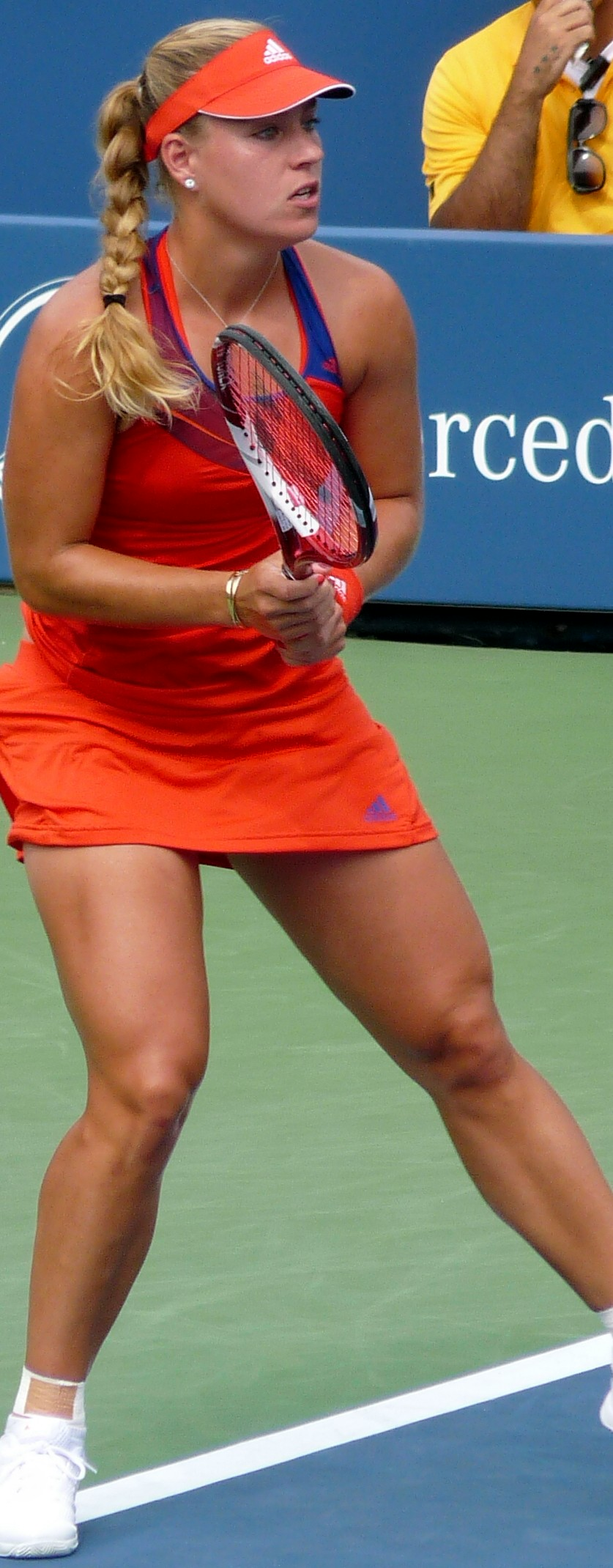 US Open 2013 - Women's Singles 4th Round (Louis Armstrong Stadium) - Angelique Kerber